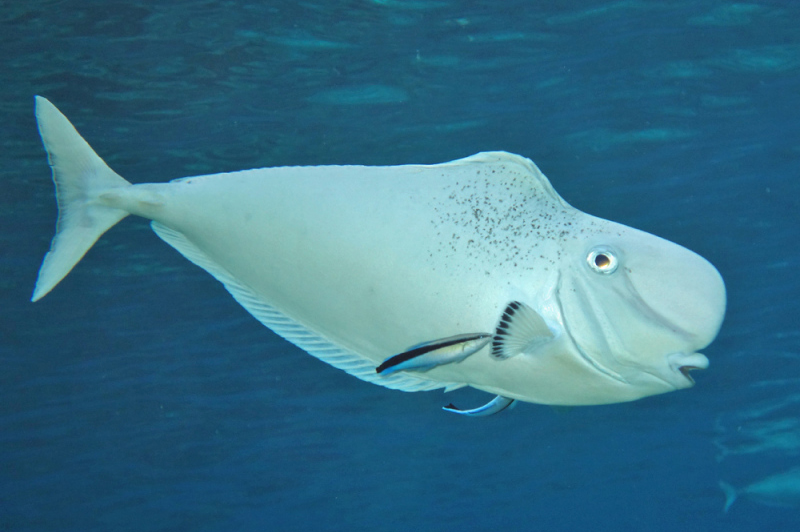 Naso tonganus en Lizard Island, Gran Barrera de Arrecifes